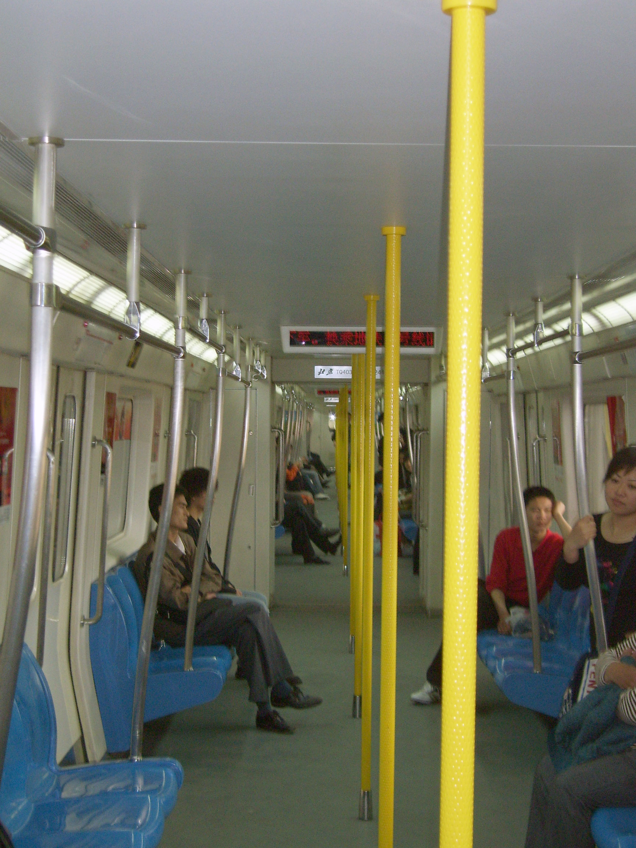 北京地铁八通线的地铁车厢内部